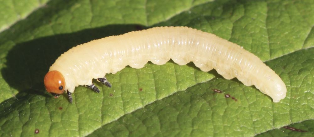 Larve der Gemeinen Kiefernbuschhornblattwespe (Diprion pini) in der Schwetzinger Hardt am 19. September 2019